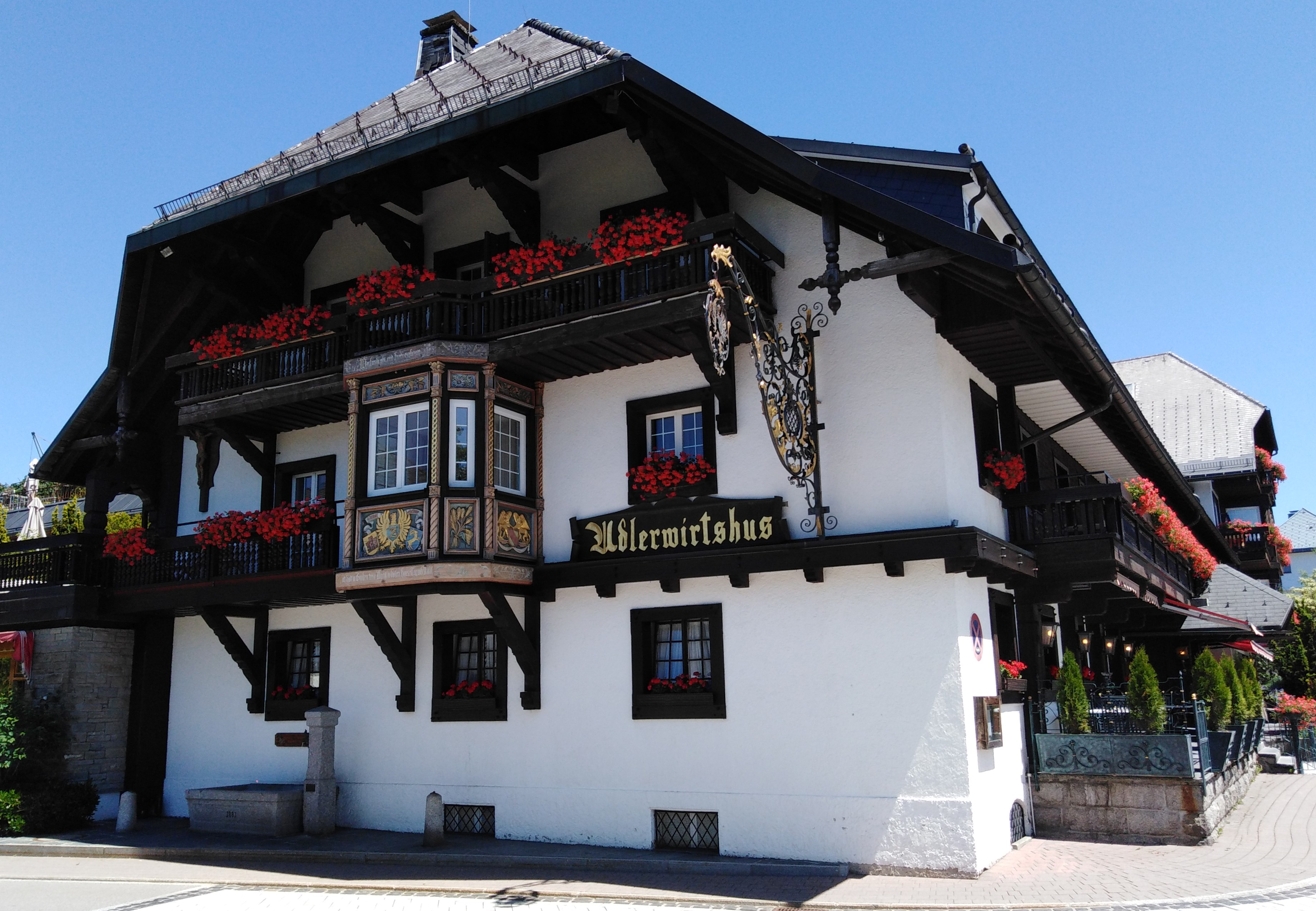 Gasthof Adler in der Gemeinde Häusern im Landkreis Waldshut in Baden-Württemberg im Südschwarzwald. Der Gasthof führt den Doppeladler (als Schwarzwaldhaus 1596 nachweisbar). Seit 1966 wird das Restaurant Adler mit einem Michelin Stern ausgezeichnet. Es gilt als das älteste Sternerestaurant Deutschlands.